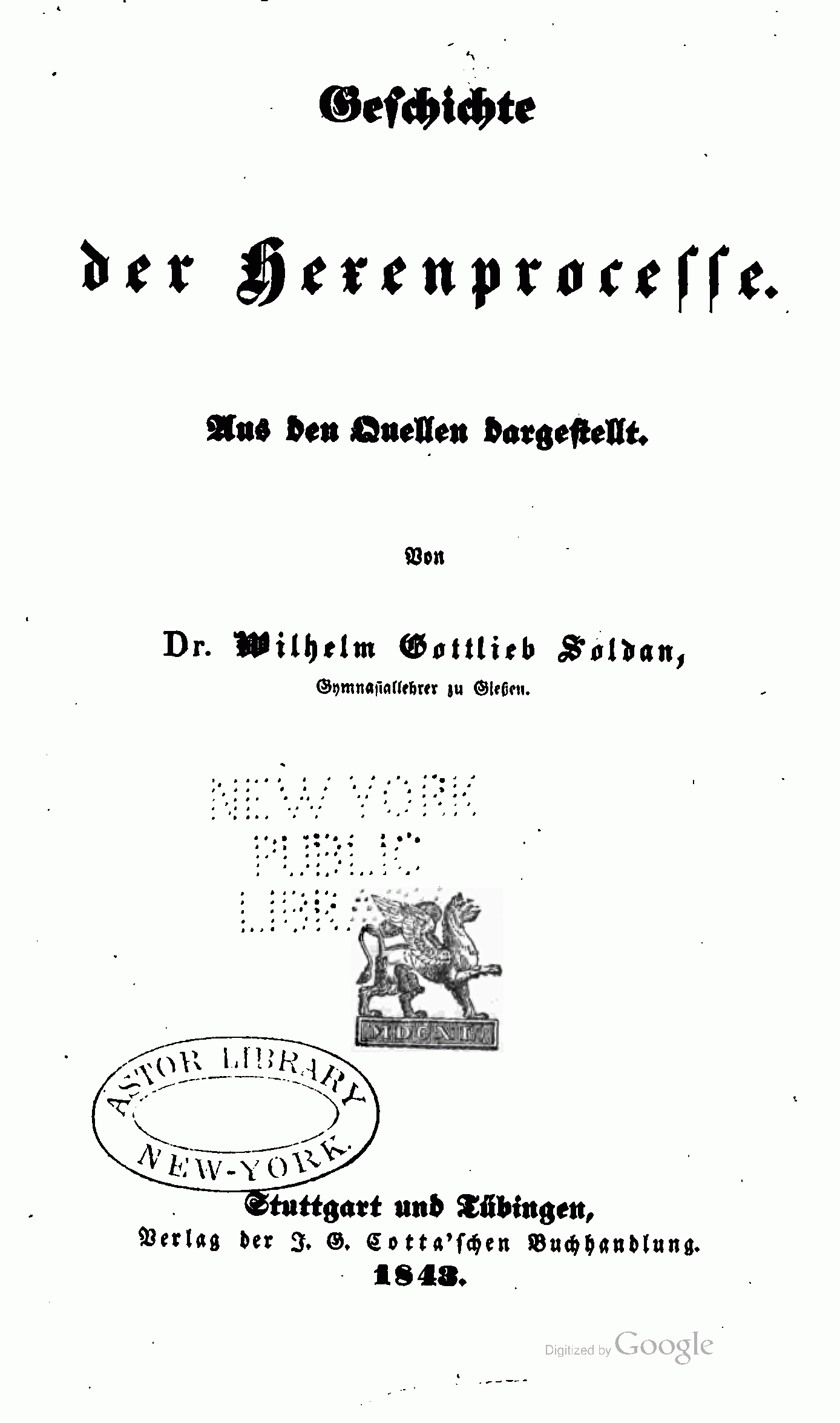 Geschichte der Hexenprocesse. Daraus: Verzeichnis der Hexen-Leut, so zu Würzburg mit dem Schwert gerichtet und hernacher verbrannt Worden. Stuttgart und Tübingen, Cotta. S. 387-392